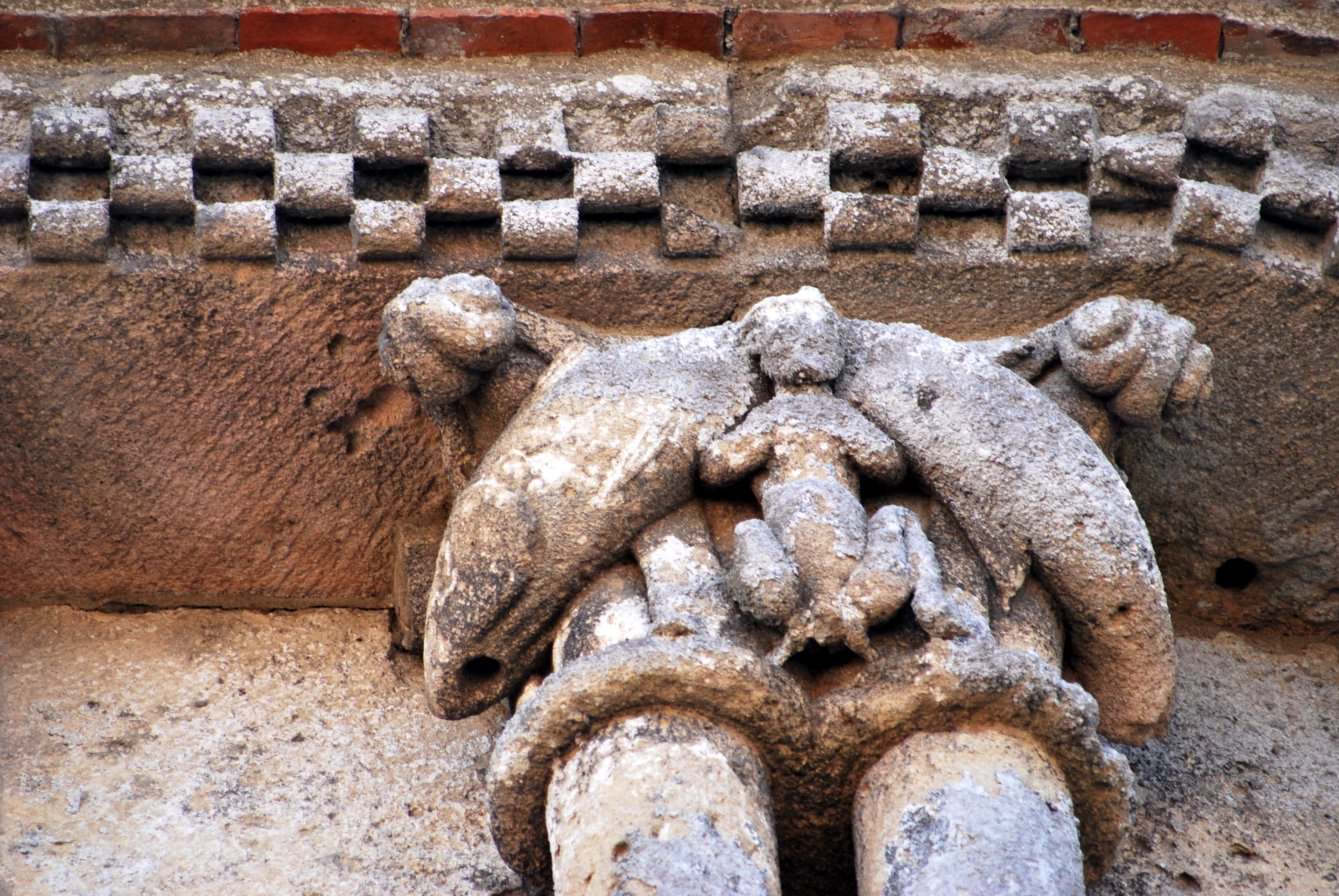 Saint-Macaire église Saint-Sauveur